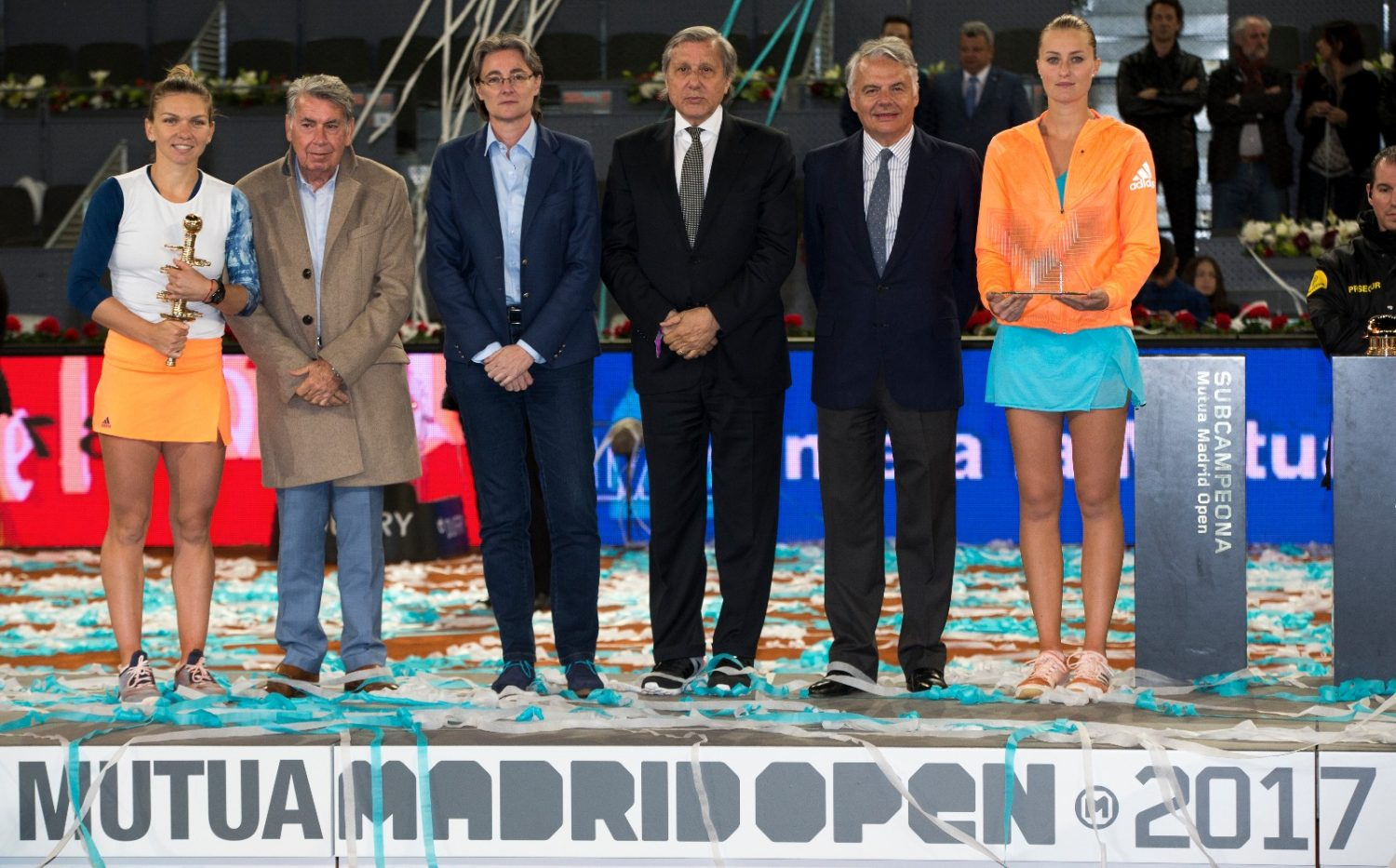 La primera teniente de alcalde del Ayuntamiento de Madrid y concejala del Área de Equidad, Derechos Sociales y Empleo, Marta Higueras, ha sido la encargada de entregar ayer el premio a la subcampeona del Mutua Madrid Open femenino. La triunfadora, la rumana Simona Halep, revalidó su título Mutua Madrid Open en la Caja Mágica ante la francesa Kristina Mladenovic.